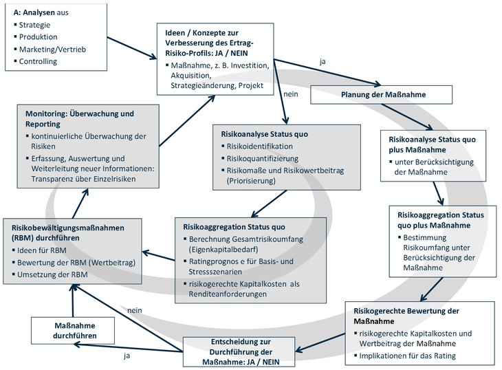 Der in Abbildung 1 dargestellte Kreislauf zeigt einen möglichen grundlegenden Verlauf eines Entscheidungsprozesses. Von Punkt A ausgehend muss zunächst ermittelt werden, ob eine Maßnahme zur Verbesserung des Ertrag-Risiko-Profils möglich ist. Ist dies der Fall, müssen die damit einhergehenden Risiken analysiert werden. Um die Maßnahme im Gesamtkontext des Unternehmens zu untersuchen, muss die Veränderung des Ertrag-Risiko-Profils des Unternehmens inklusive der Entscheidung mittels der Risikoaggregation untersucht werden. Daraus lässt sich ableiten, inwiefern die Maßnahme sinnvoll und förderlich für das Unternehmen ist. Folglich lässt sich die Maßnahme entweder durchführen oder verwerfen. Ist keine Maßnahme zur Verbesserung des Ertrag-Risiko-Profils möglich, so gilt es, eine Risikoanalyse und -aggregation durchzuführen, um das Ertrag-Risiko-Profil des Unternehmens aktuell zu halten. An die Risikoaggregation schließt die Risikobewältigungsmaßname an. Generell gilt es Risiken zu optimieren und nicht zu minimieren, um einen höchstmöglichen Ertrag bei geringstmöglichem Risiko zu erwirtschaften5. Anschließend sollten Einzelrisiken konstant überwacht und die Informationen weitergegeben werden, um diese neuen oder veränderten Risiken im nächsten Zyklus des Kreislaufs miteinzubeziehen.